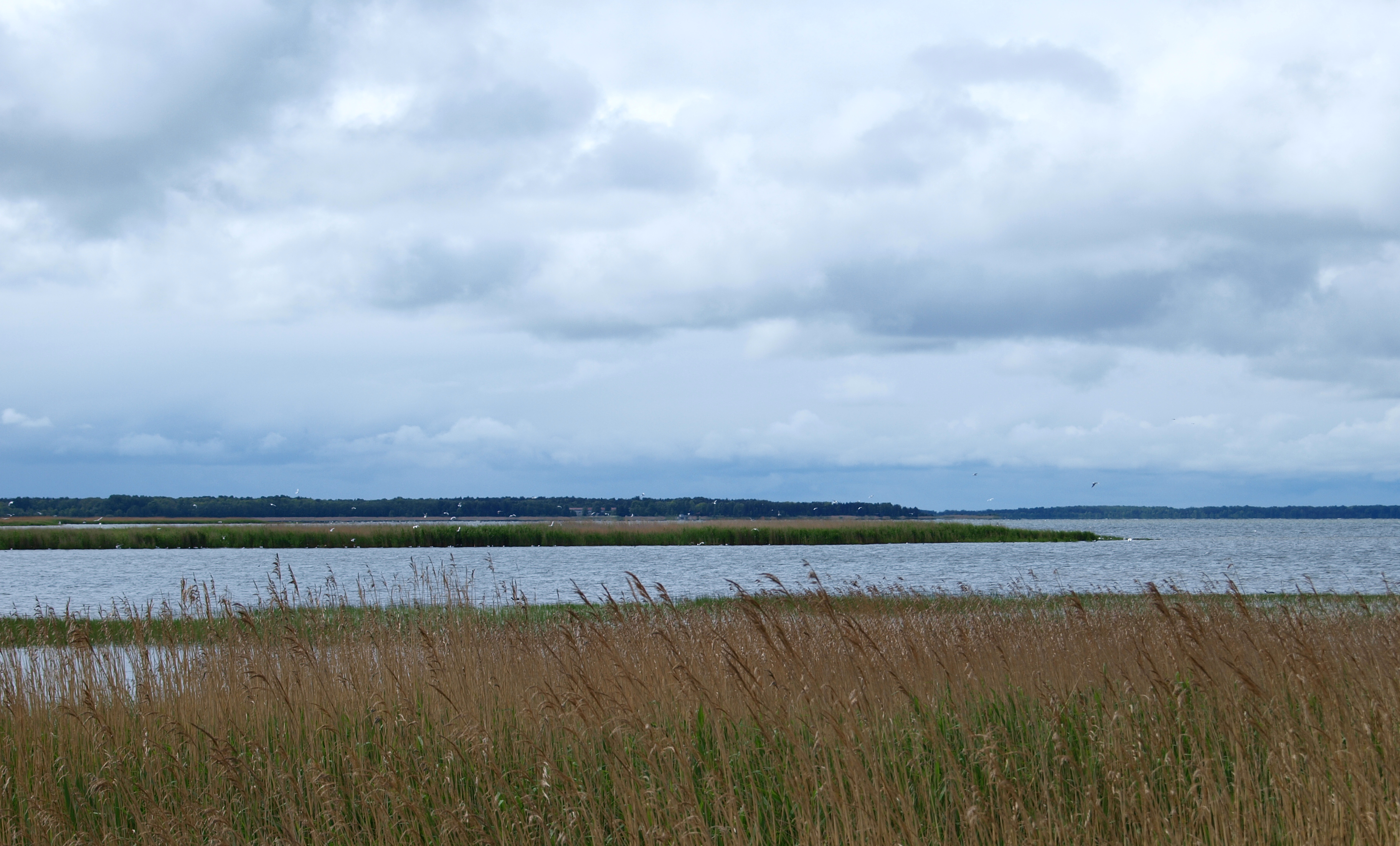 Pildil Haapsalu laht (Eeslaht)